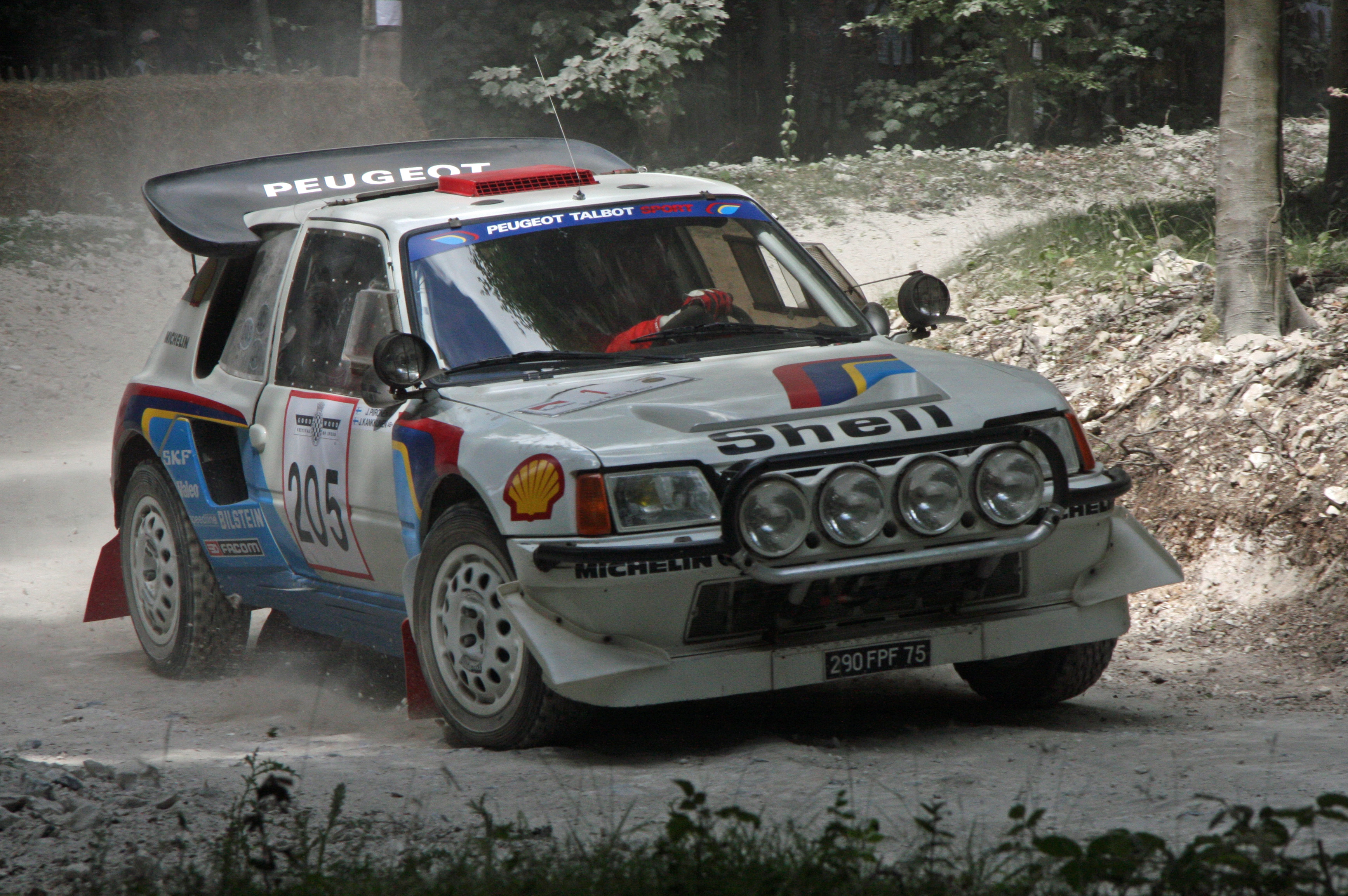 Peugeot 205 T16